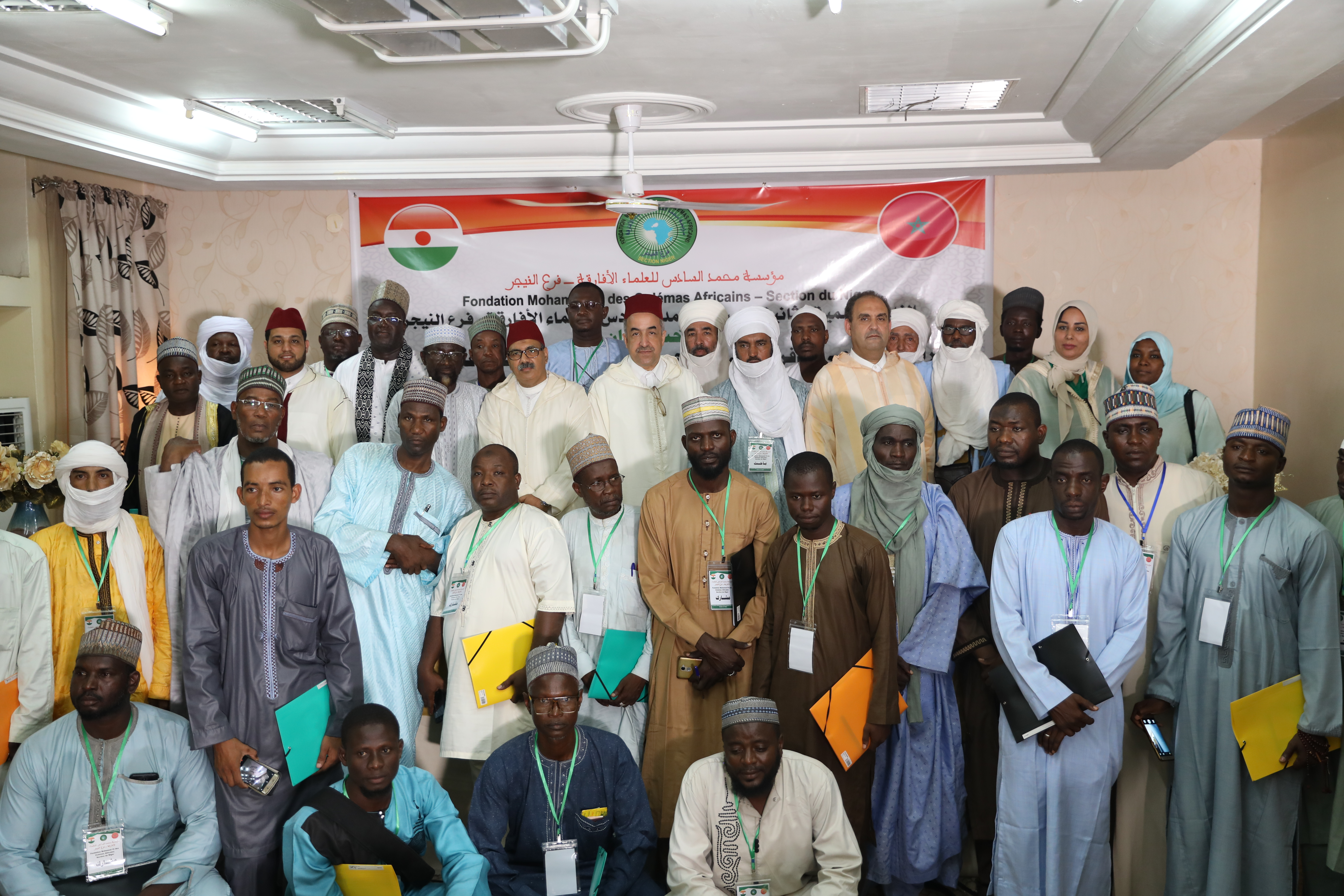 دوة التراث الإسلامي الإفريقي في النيجر بين الماضي والحاضر وآفاق المستقبل-نيامي 2019